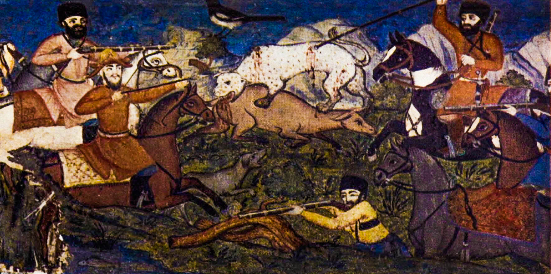 Şəki xan sarayında ov təsviri